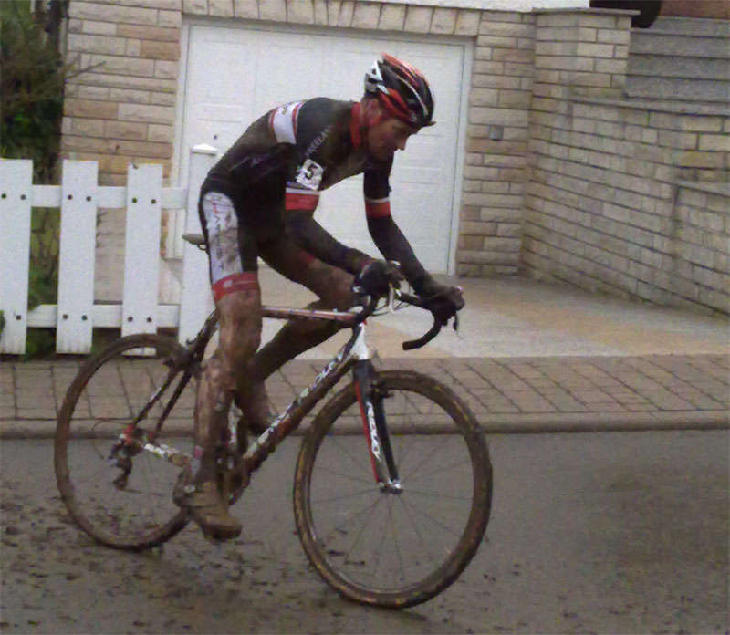 De Pascal Triebel, am Cyclo-Cross Championnat zu Keel.